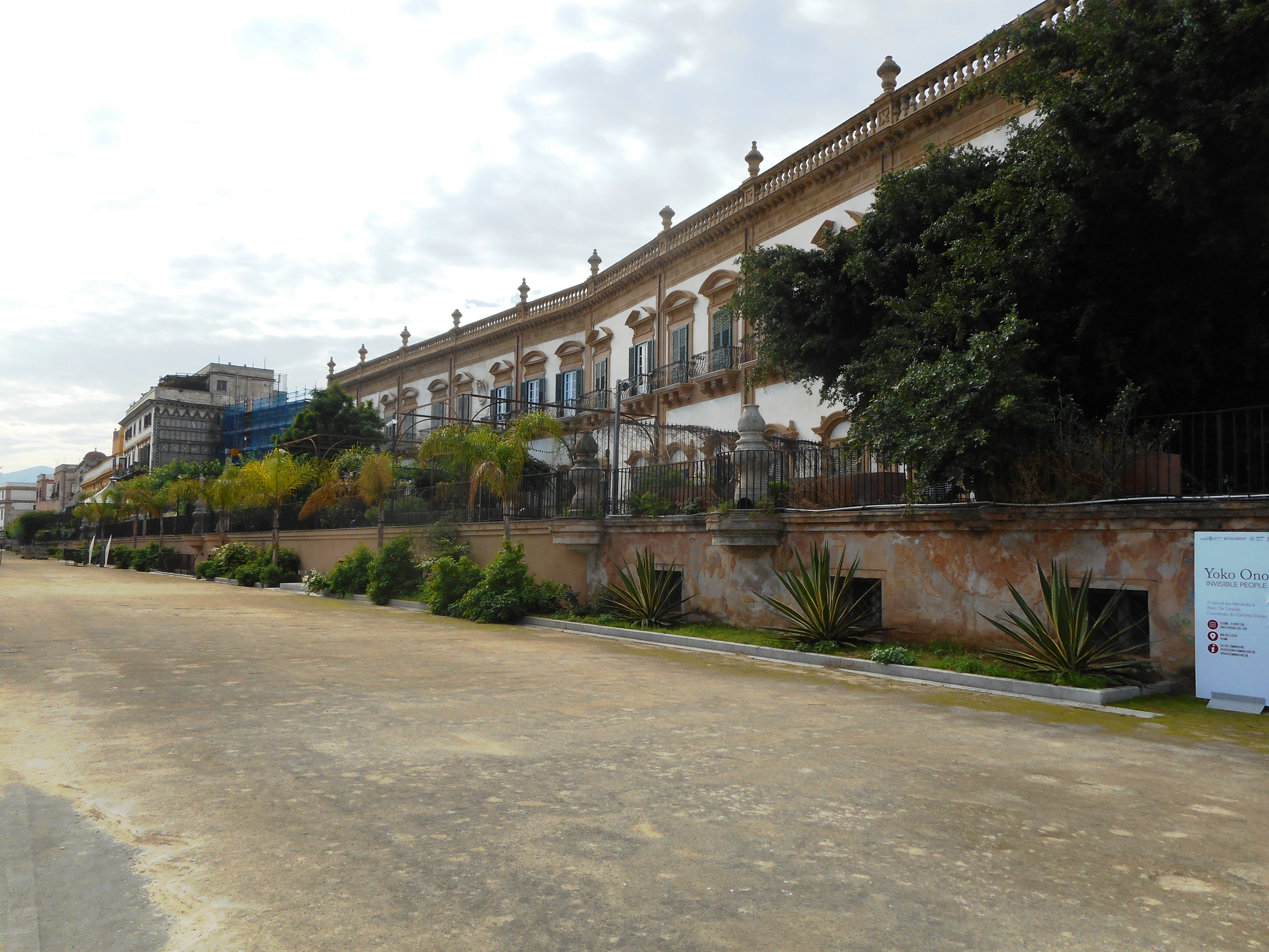 Facciata di Palazzo Butera dalla passeggiata delle Mura delle Cattive